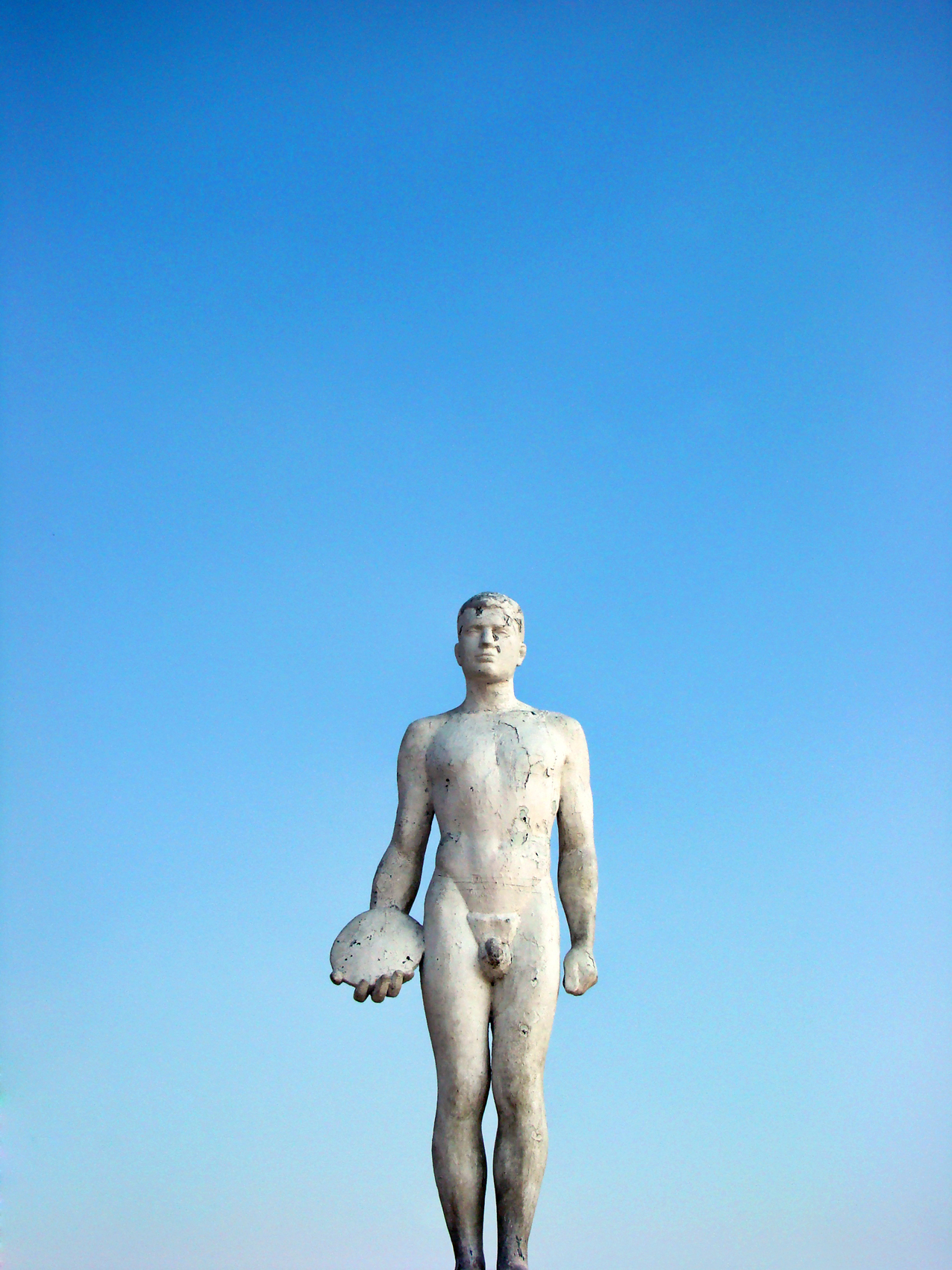 Estadio Nacional This is a photo of a national monument in Chile: 592